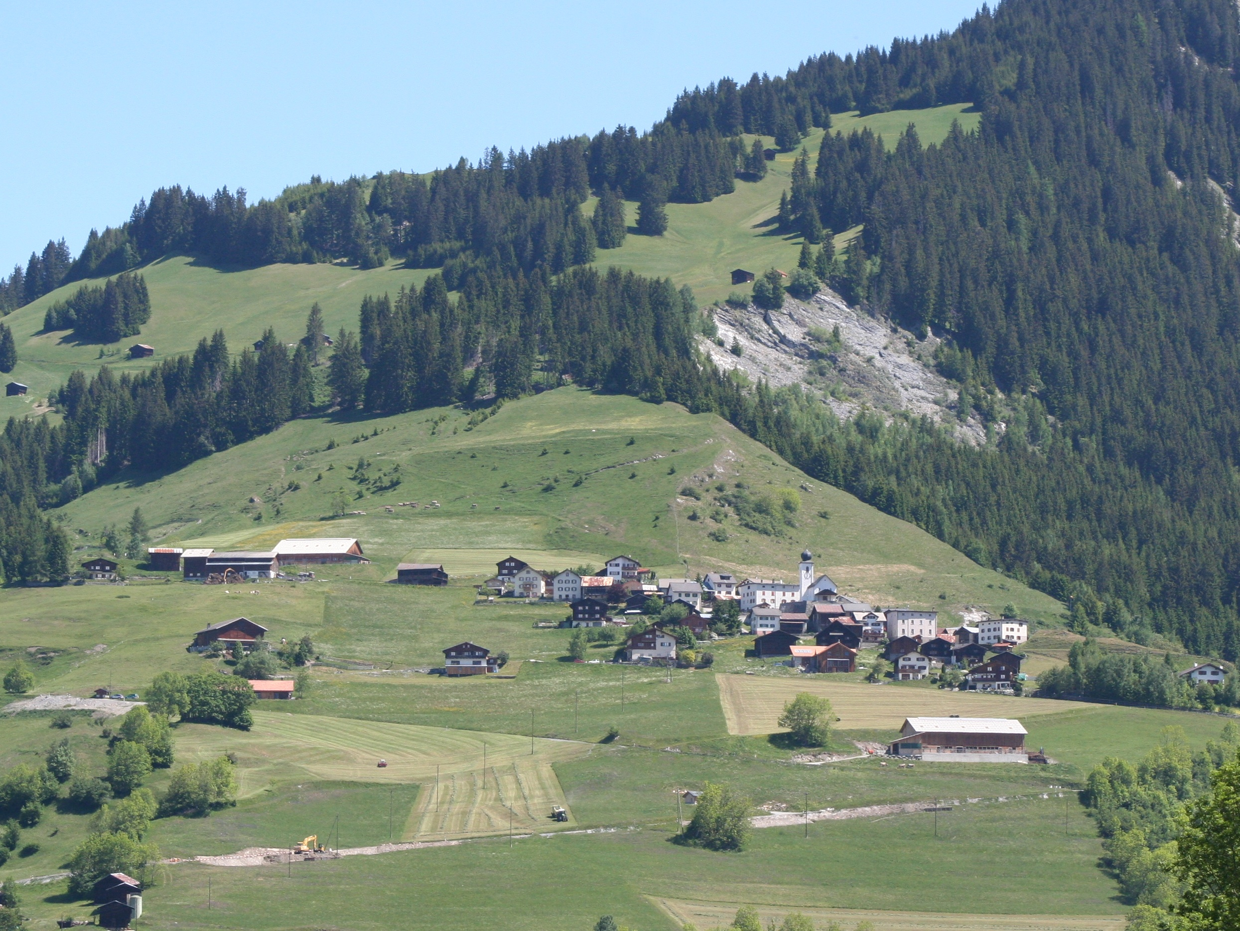 Riein